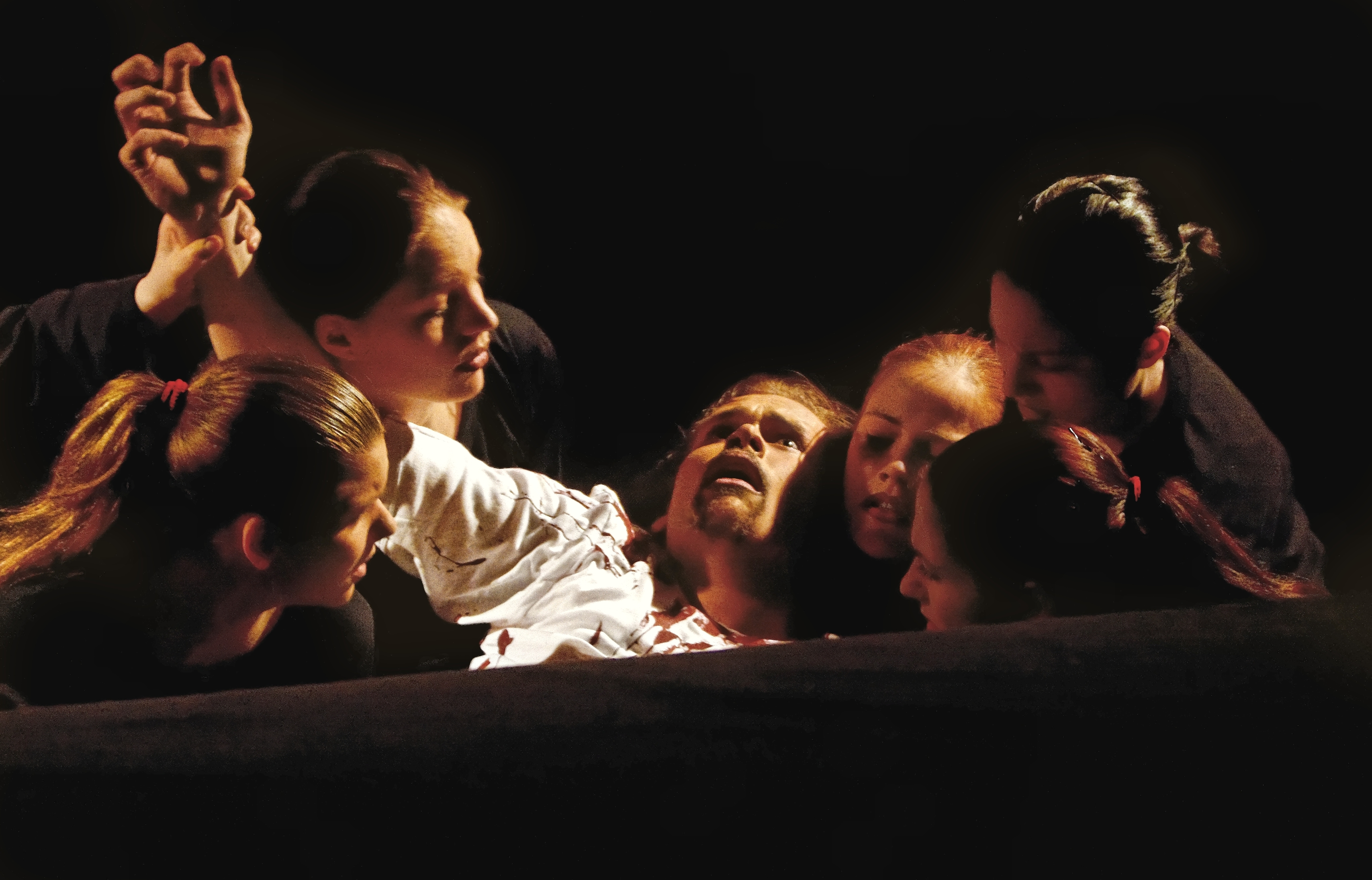 Szene aus einer Aufführung der griechischen Tragödie Agamemnon nach Aischylos unter der Regie von René Böttcher an der Studiobühne Siegburg (Lehrbühne der Schauspielschule Siegburg) in Siegburg in Nordrhein-Westfalen (Deutschland).